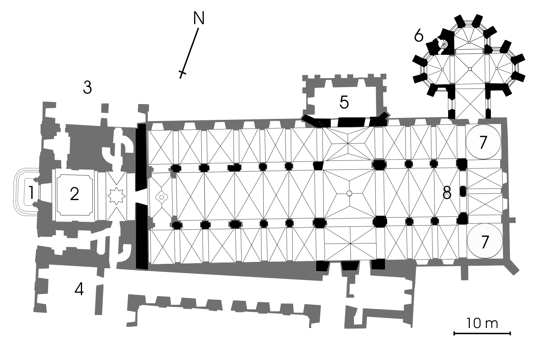 Grundriss der ehemaligen Klosterkirche Mariä Himmelfahrt in Leubus. Die schwarzen Bauteile stammen noch aus gotischer Zeit (1. Hälfte des 14. Jahrhunderts), die grauen Abschnitte wurden im Barock hinzugefügt. Hauptportal Vorhalle Prälatur Konventsgebäude Lorettokapelle Fürstenkapelle Chorumgangskapellen Chor mit Altartisch Zeichner: PetrusSilesius auf Grundlage des Kirchengrundrisses von Hans Lutsch von 1903.